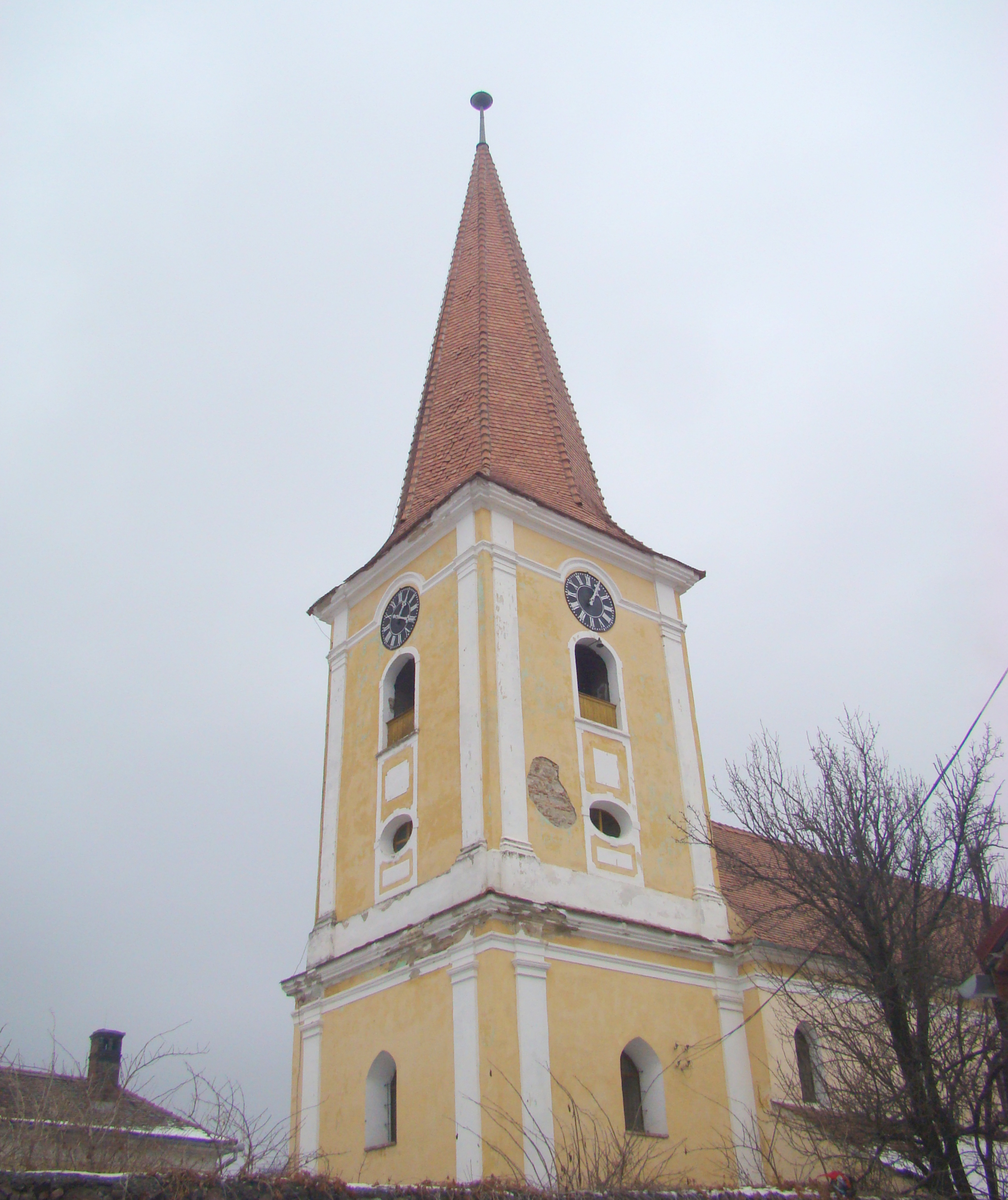 Turnul bisericii evanghelice din Șelimbăr, județul Sibiu